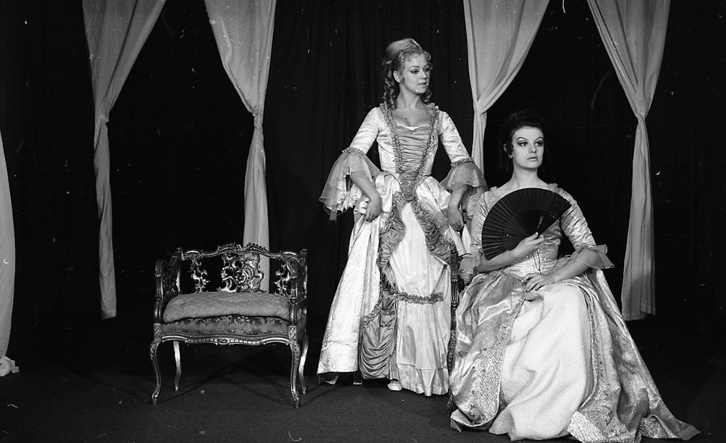 Jean Baptiste Poquelin Molière, Ljudomrznik, UL AGRFT. Na fotografiji: Ljerka Belak (Arsinoa) in Anica Sivec (Celimena).